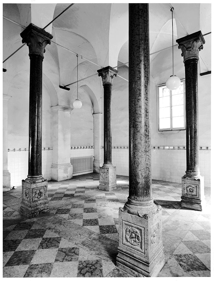 Interno dell'oratorio dell'antico ospedale